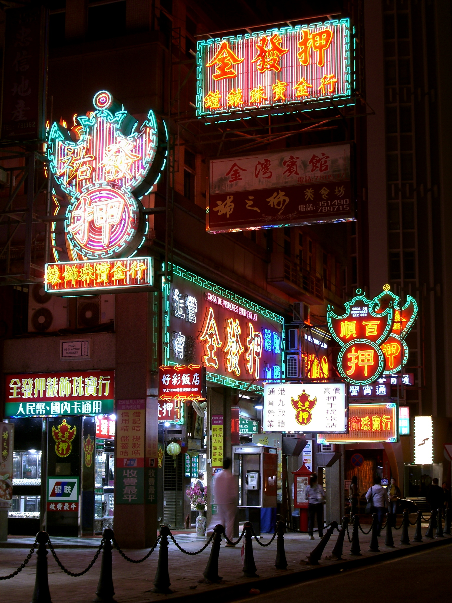 Macau Pawn Shops